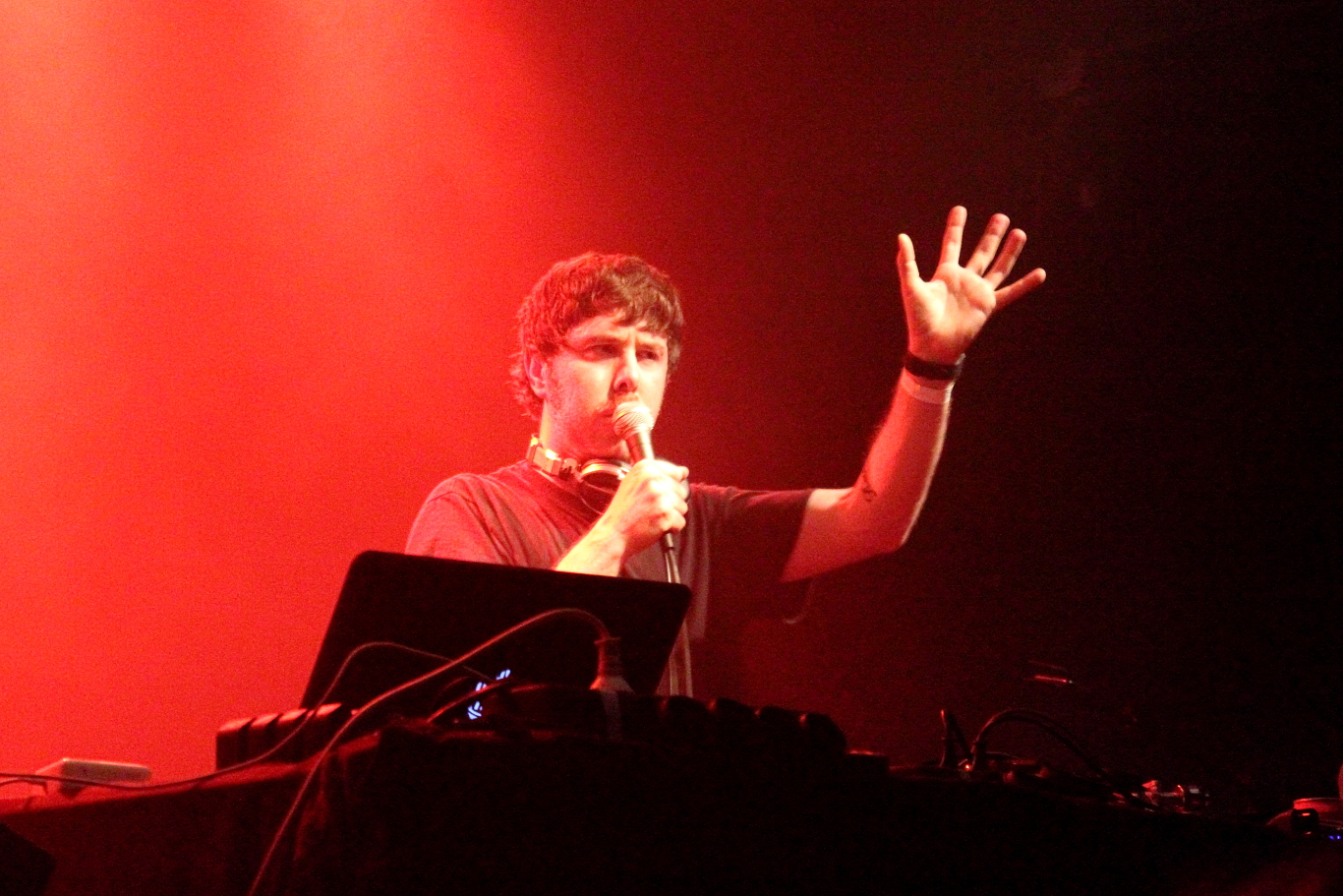 James Pants en concert au Confort Moderne à Poitiers - Septembre 2011. Pour écouter James Pants. Flickr Tags: Confort Moderne Confort Moderne Poitiers Concert Music Musique Musicians Musiciens Stage Live Playing Pop Scène James Pants Electronic Stones Throw. from Flickr album "Le Confort Moderne" by Xi WEG